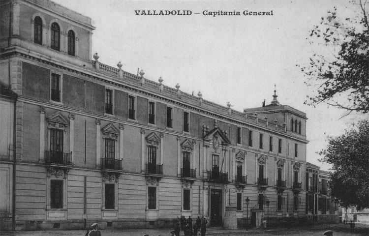 Palacio Real - Valladolid - Colección Valladolid, postales para el Recuerdo, editada por el Diario El Mundo de Valladolid. Valladolid. Capitanía General. - Fotografía. Papel 140 x 90 B/N